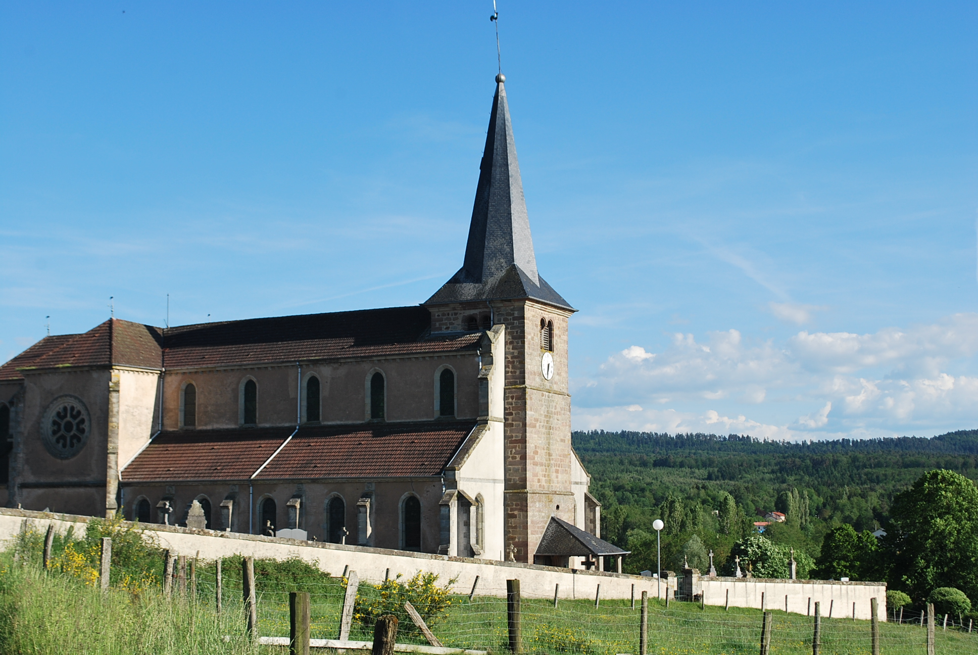 Église Notre-Dame de la Navité de Grandvillers